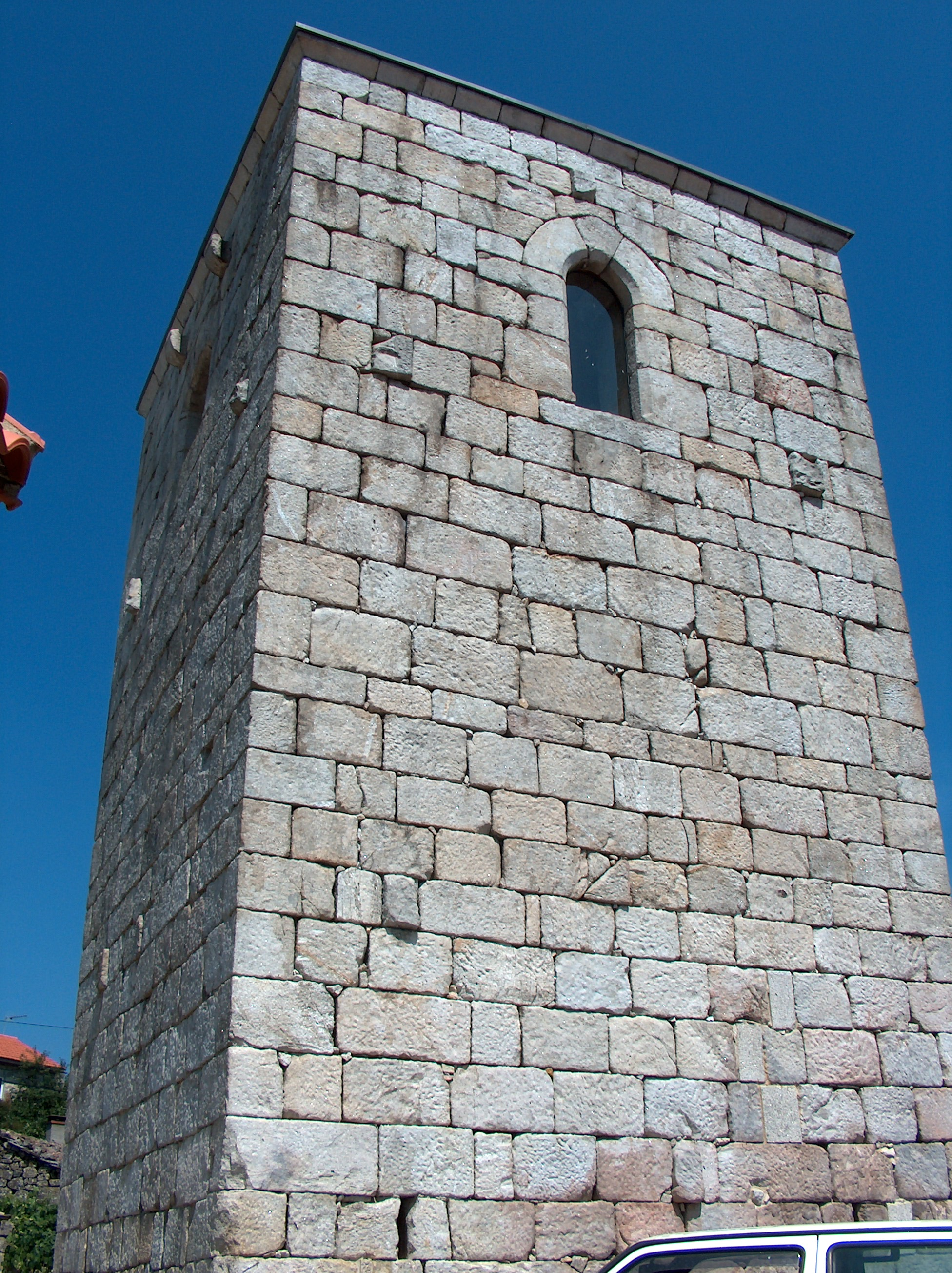 Descrição Torre de Alcofra, no concelho de Vouzela em Portugal. Fonte Carregada pelo autor Autor João Carvalho